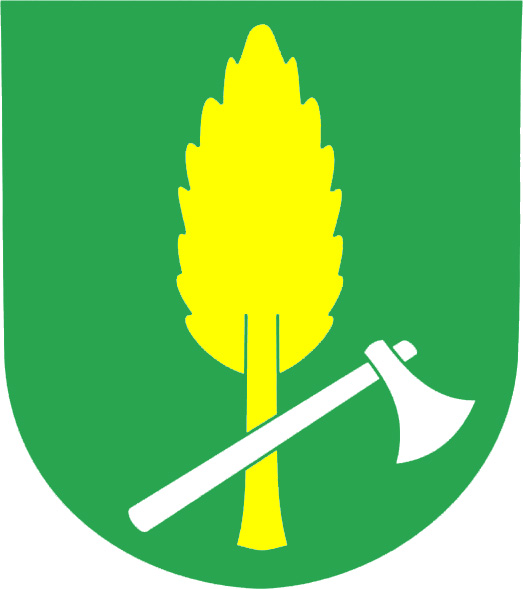 Česky: znak obce Řídeč